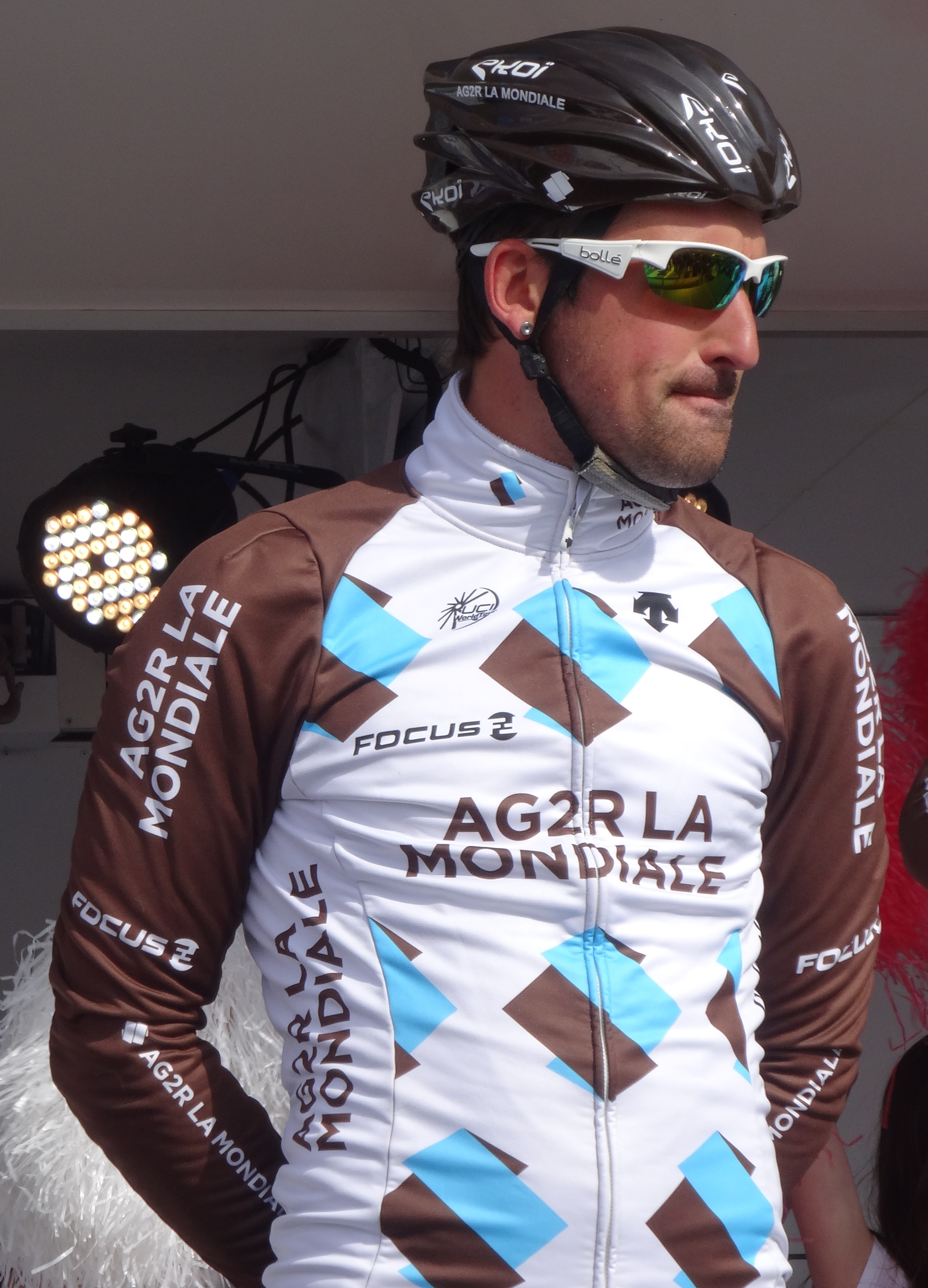 Reportage réalisé le jeudi 17 avril à l'occasion du départ et de l'arrivée du Grand Prix de Denain 2014 à Denain, Nord, Nord-Pas-de-Calais, France.